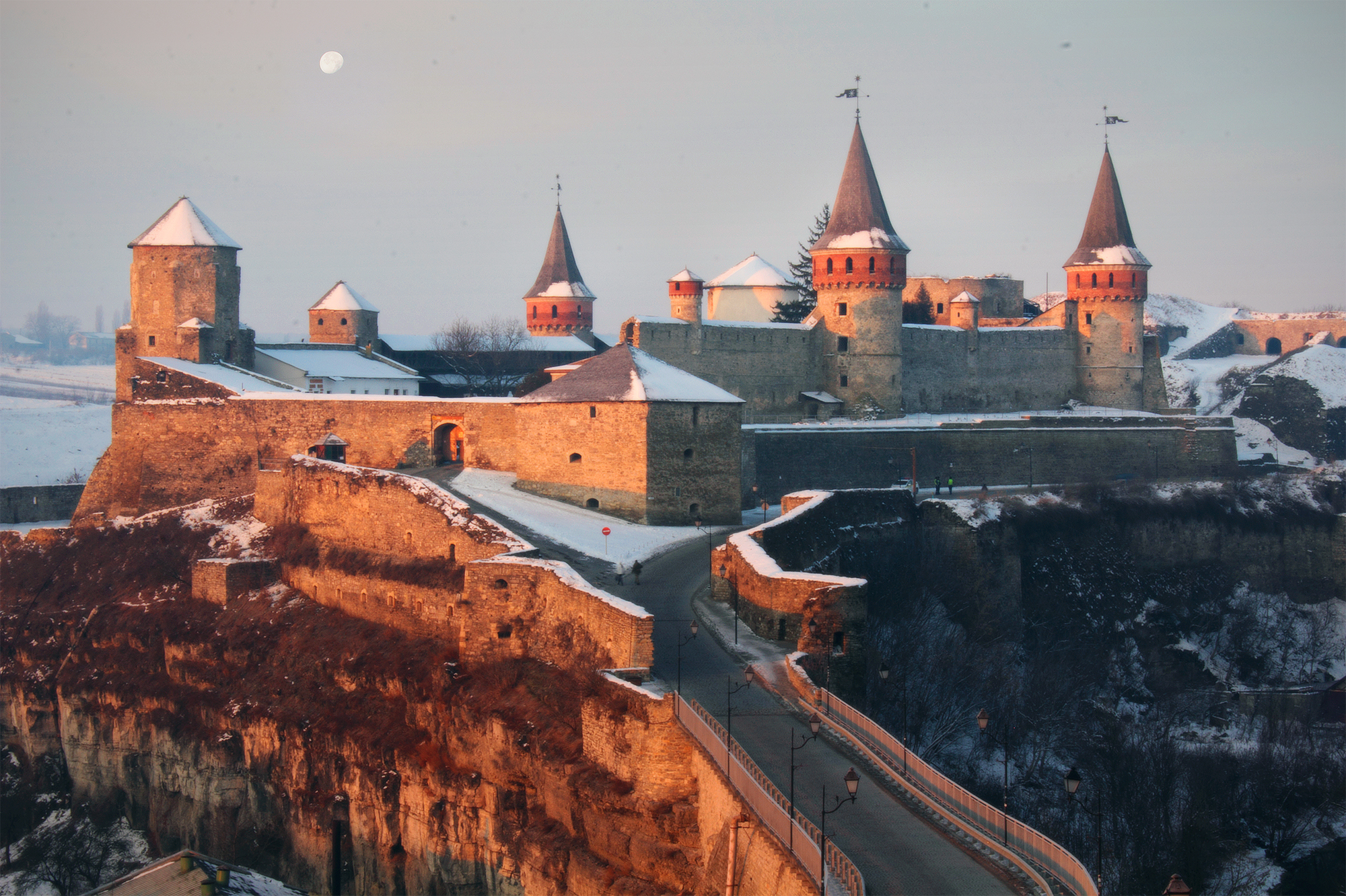 Фортеця, Кам'янець-Подільський, вул. Замкова